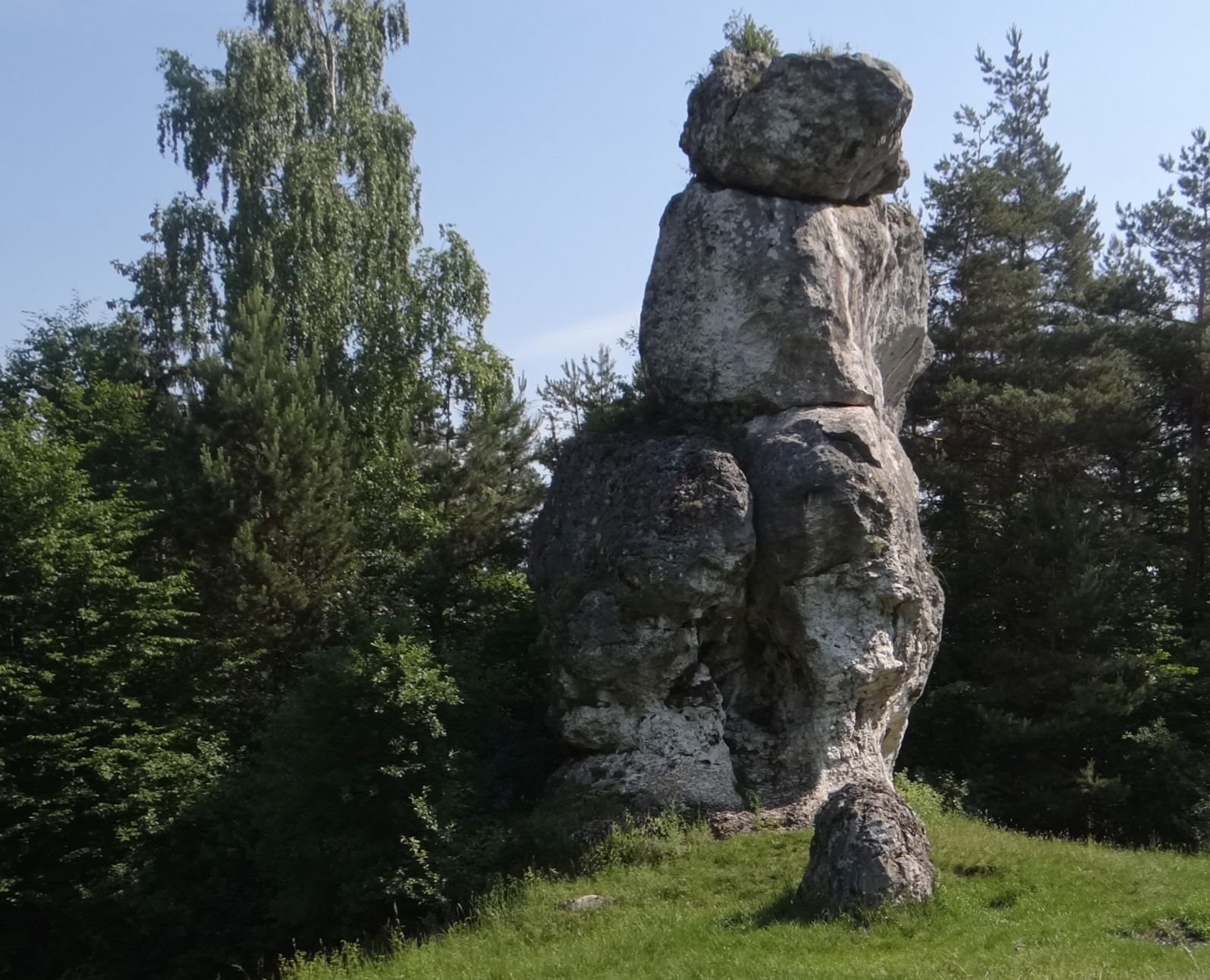 Skała na Górze Słupsko